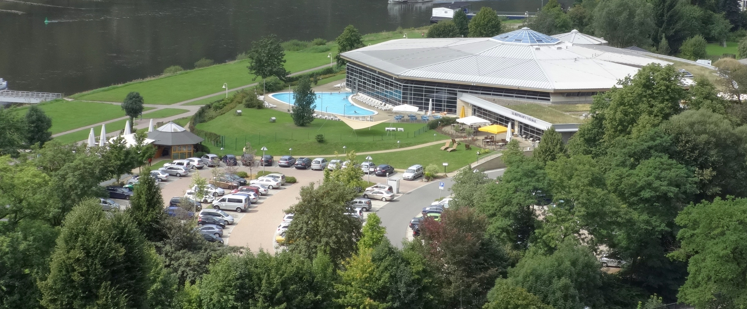 Blick auf die Toskana-Therme von Bad Schandau-Ostrau (Aufzug); links die Elbe